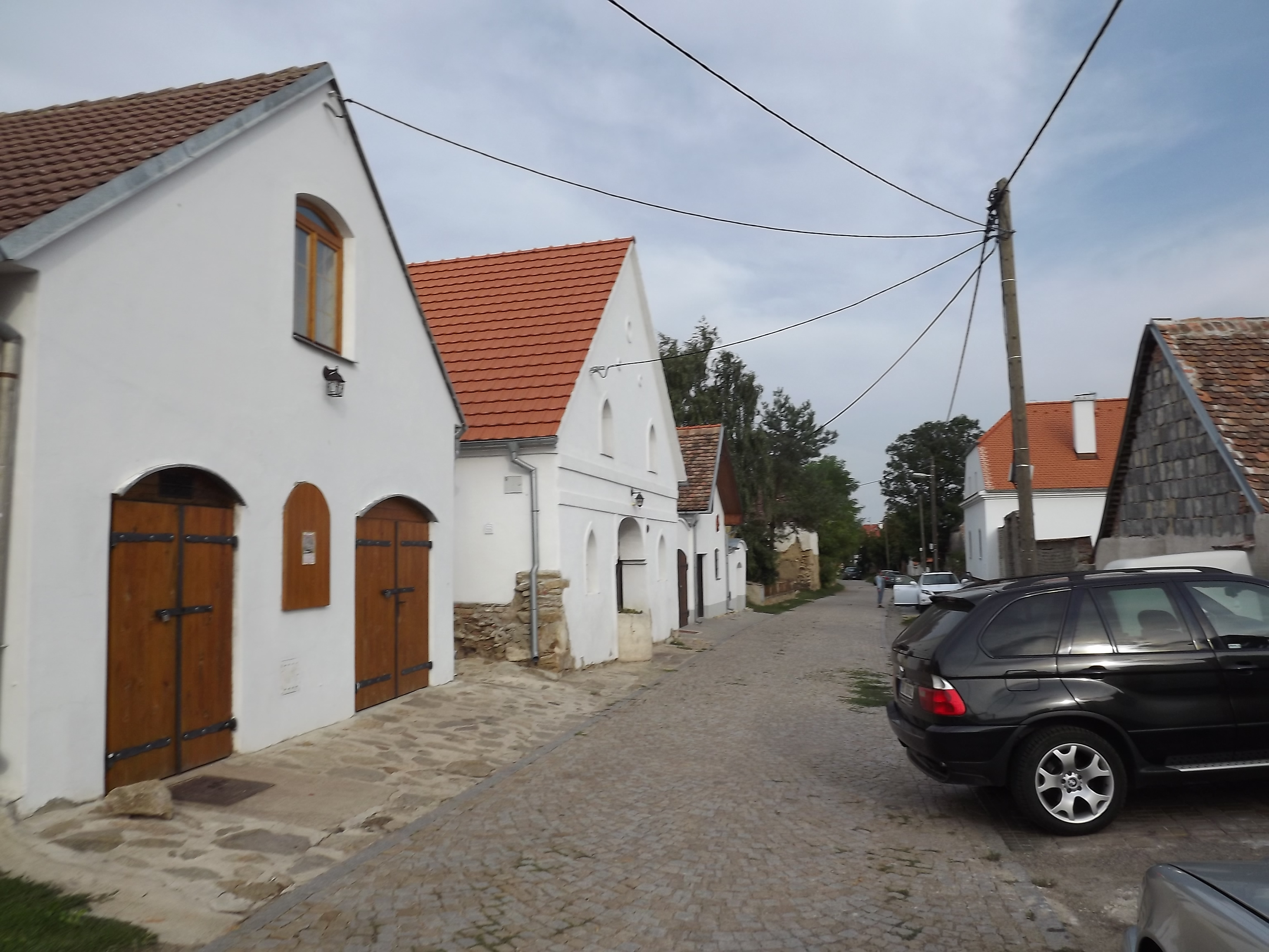 Šatov - sklepní ulice